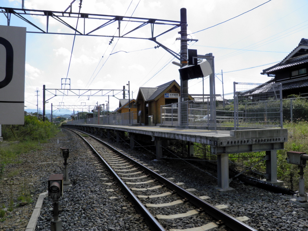 JR西日本・和歌山線北宇智駅（奈良県五條市）